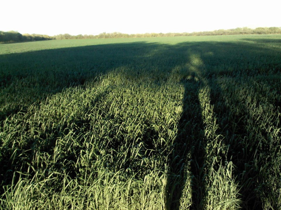 sembradio de marihuana en culiacan sinaloa